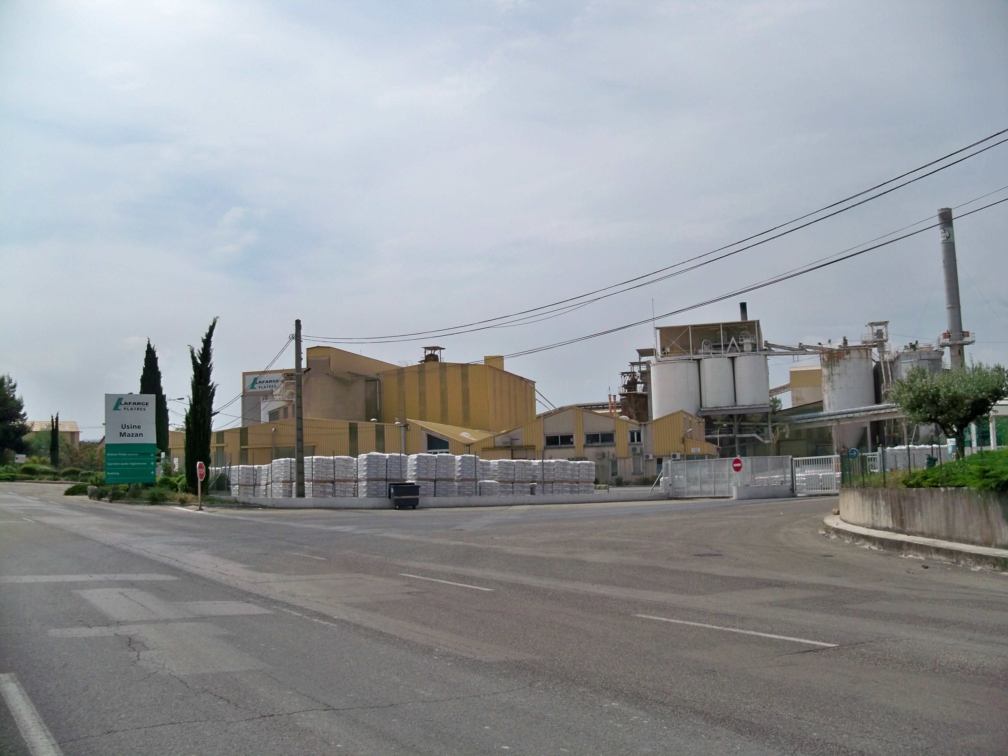 Entrée de la carrière Lafarge de Mazan (84)